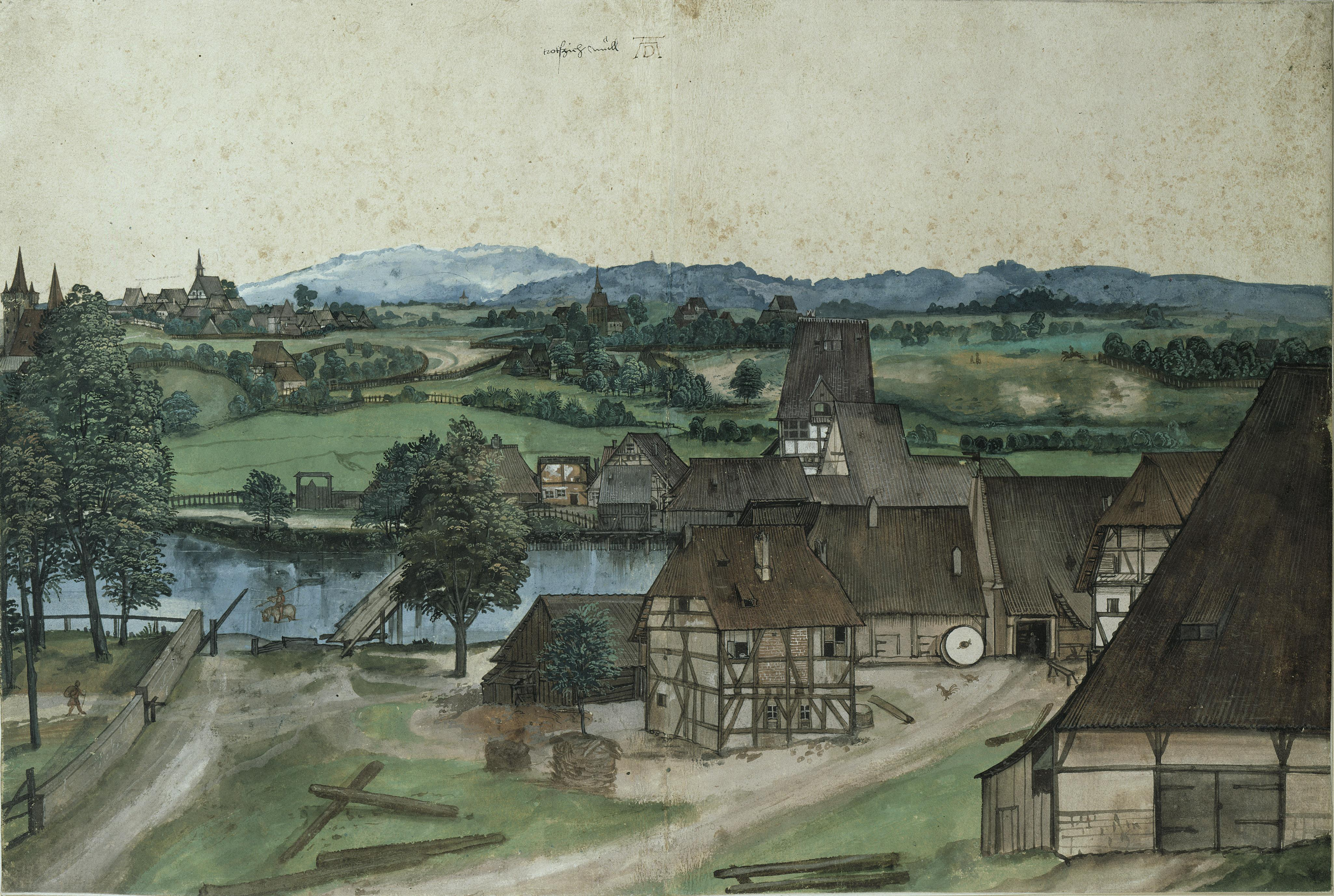 Hallerwiesen an der Pegnitz außerhalb Nürnbergs